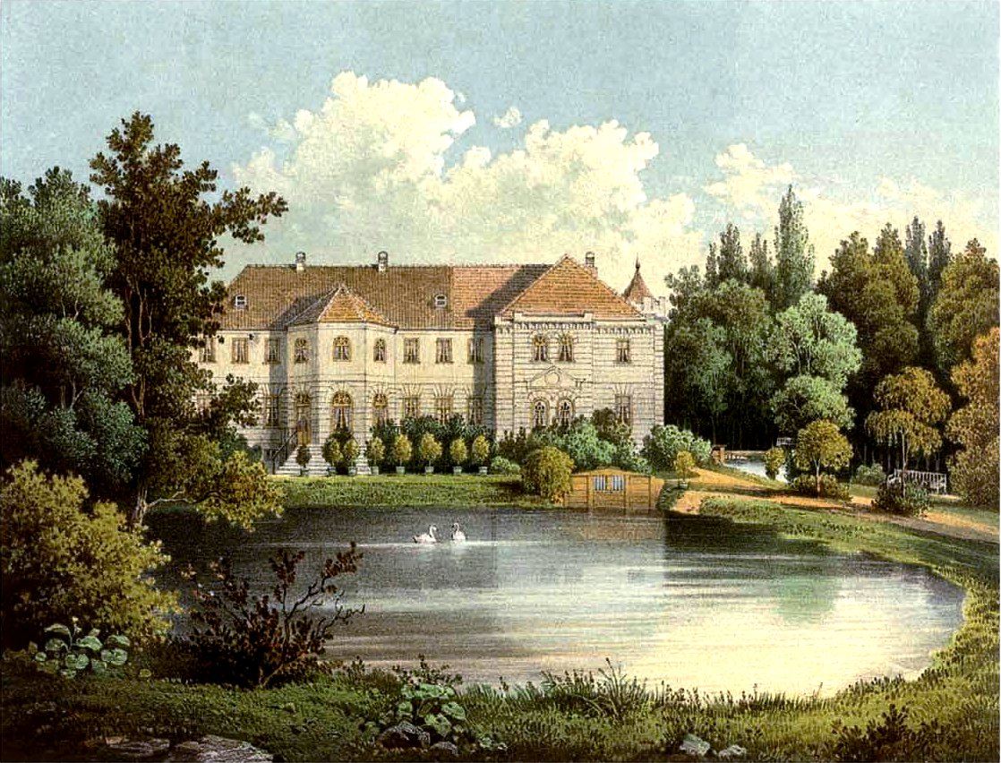 Schloss Grünhoff in Roschino bei Cranz, Lithographie von Alexander Duncker, 1869